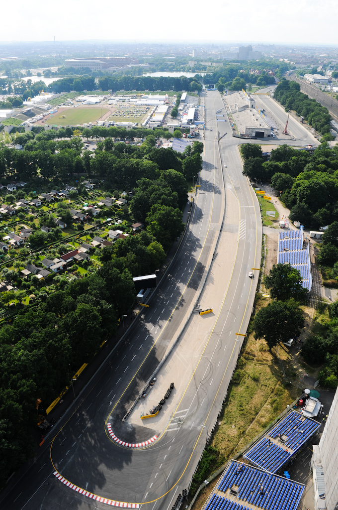 Norisring in Nürnberg im Jahr 2008, vorne im Bild die Grundigkehre, vorne rechts Grundig-Tribüne, vorne mitte Schöller-Tribüne, rechts hinten Steintribüne, hinten links Fahrerlager, Boxengasse, Aussteller, Hubschrauber-Landeplatz